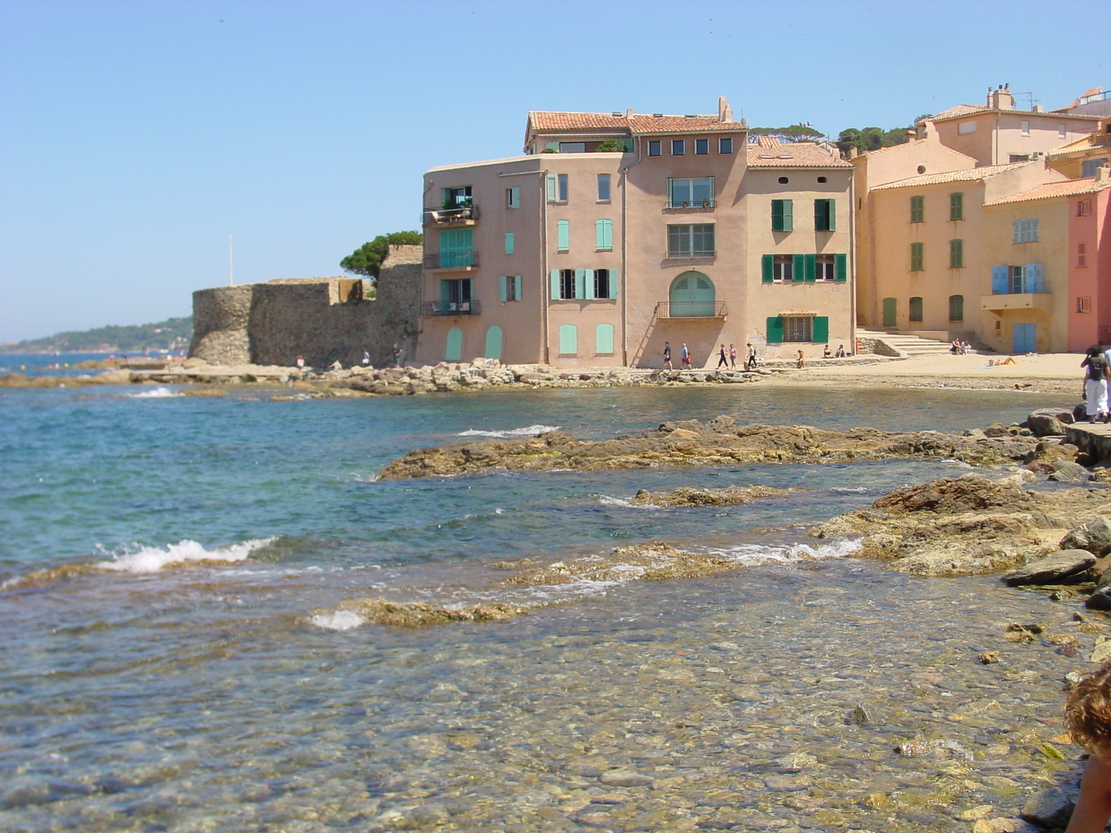 St. Tropez